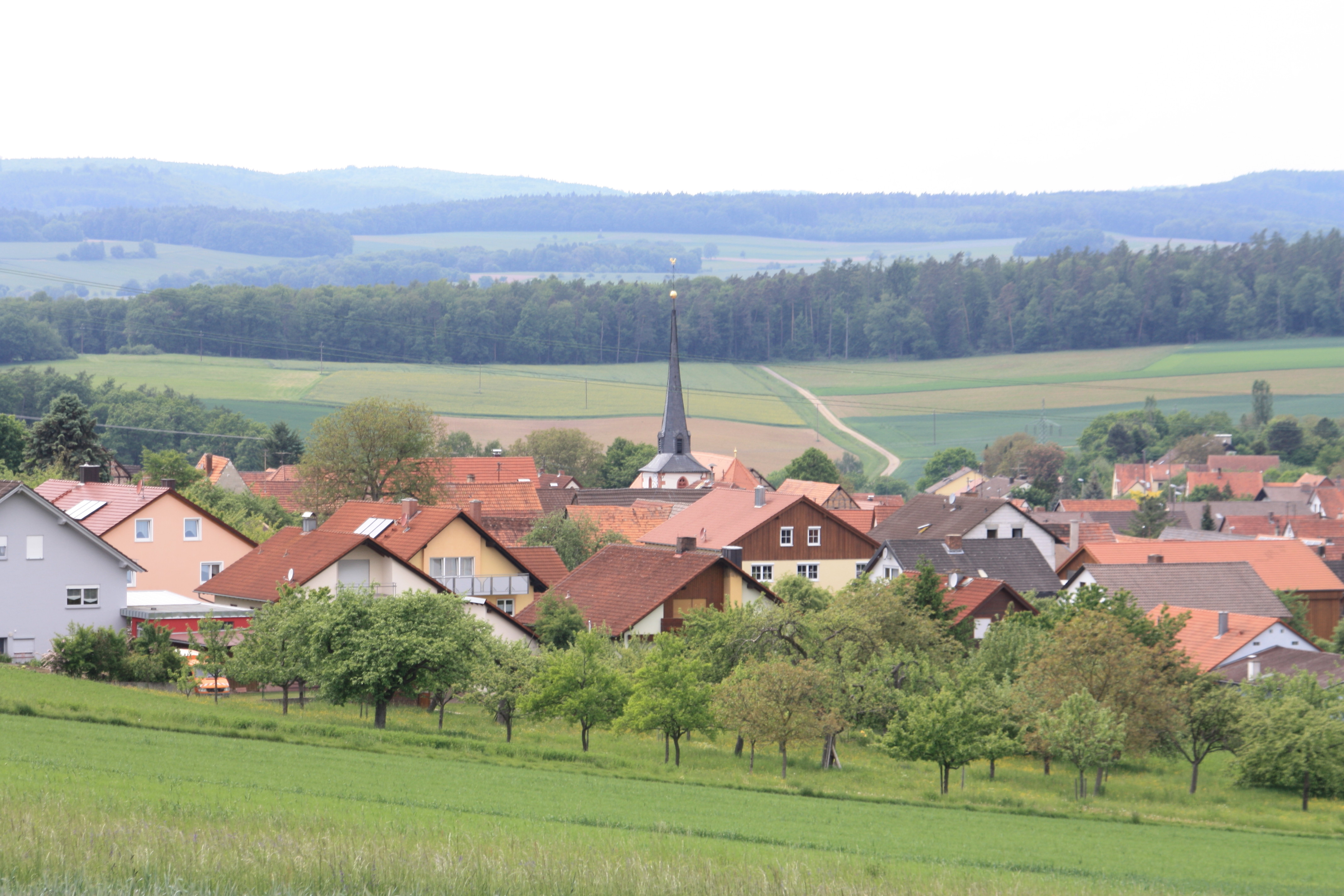 Roden von Südosten